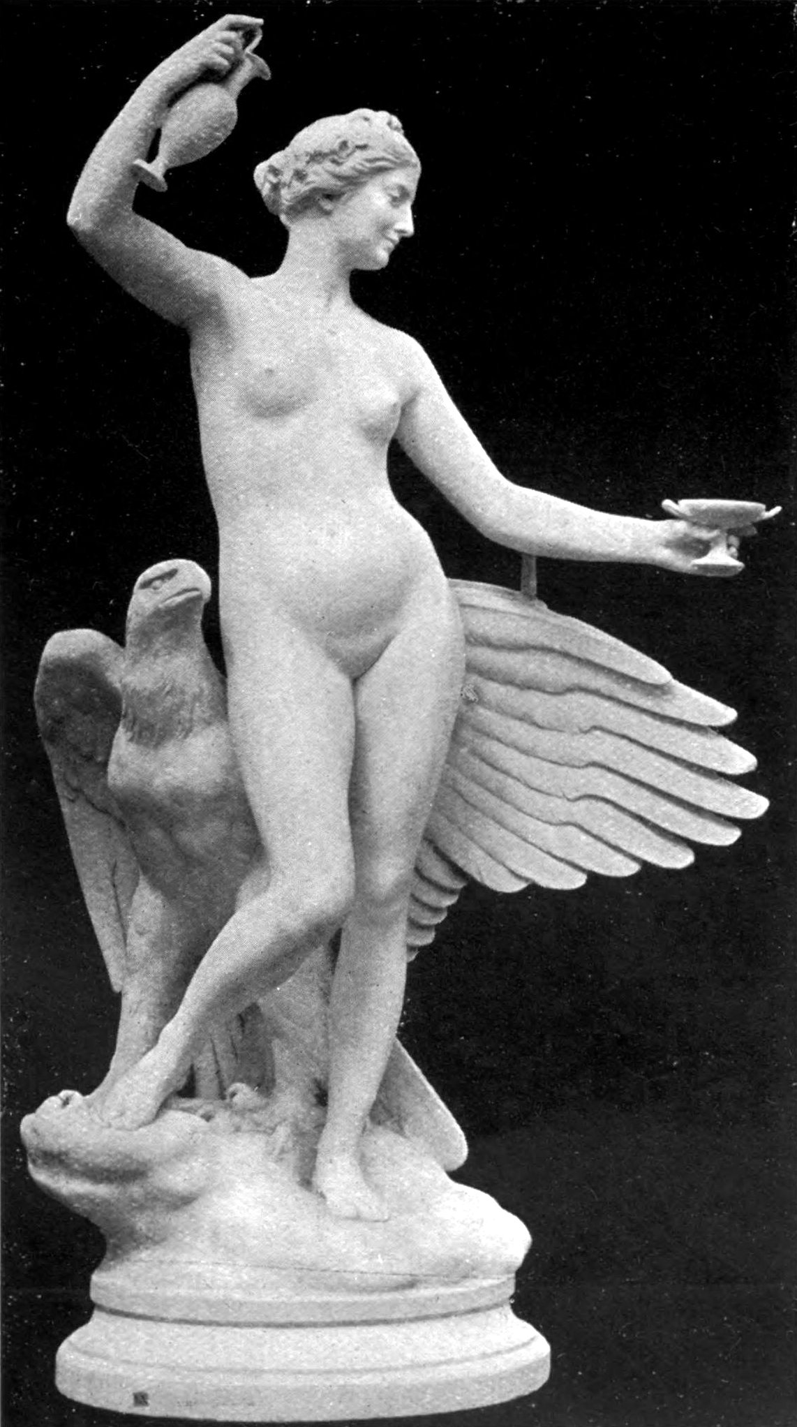 Hébé